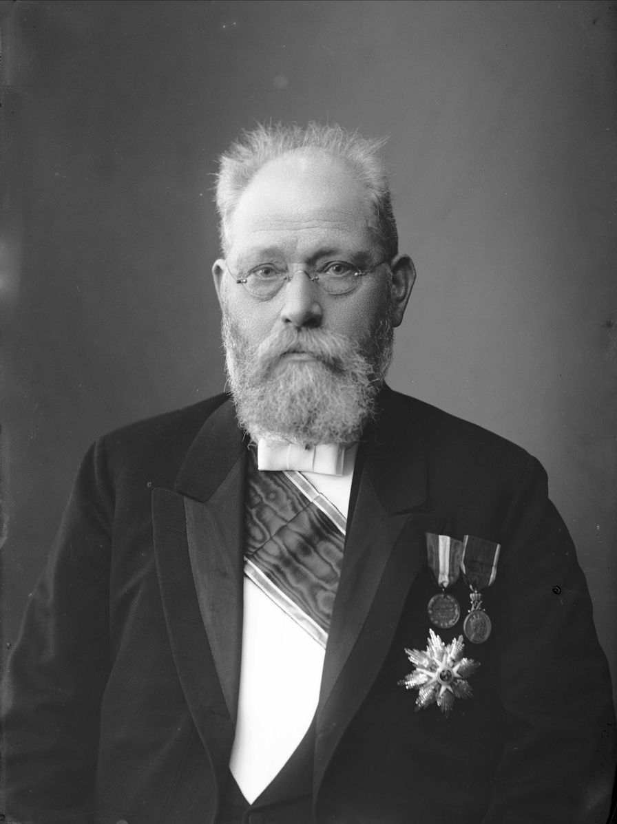 Abraham Theodor Berge i 1912, portrett, mann, amtmann, orden, medaljer, brystbilde.